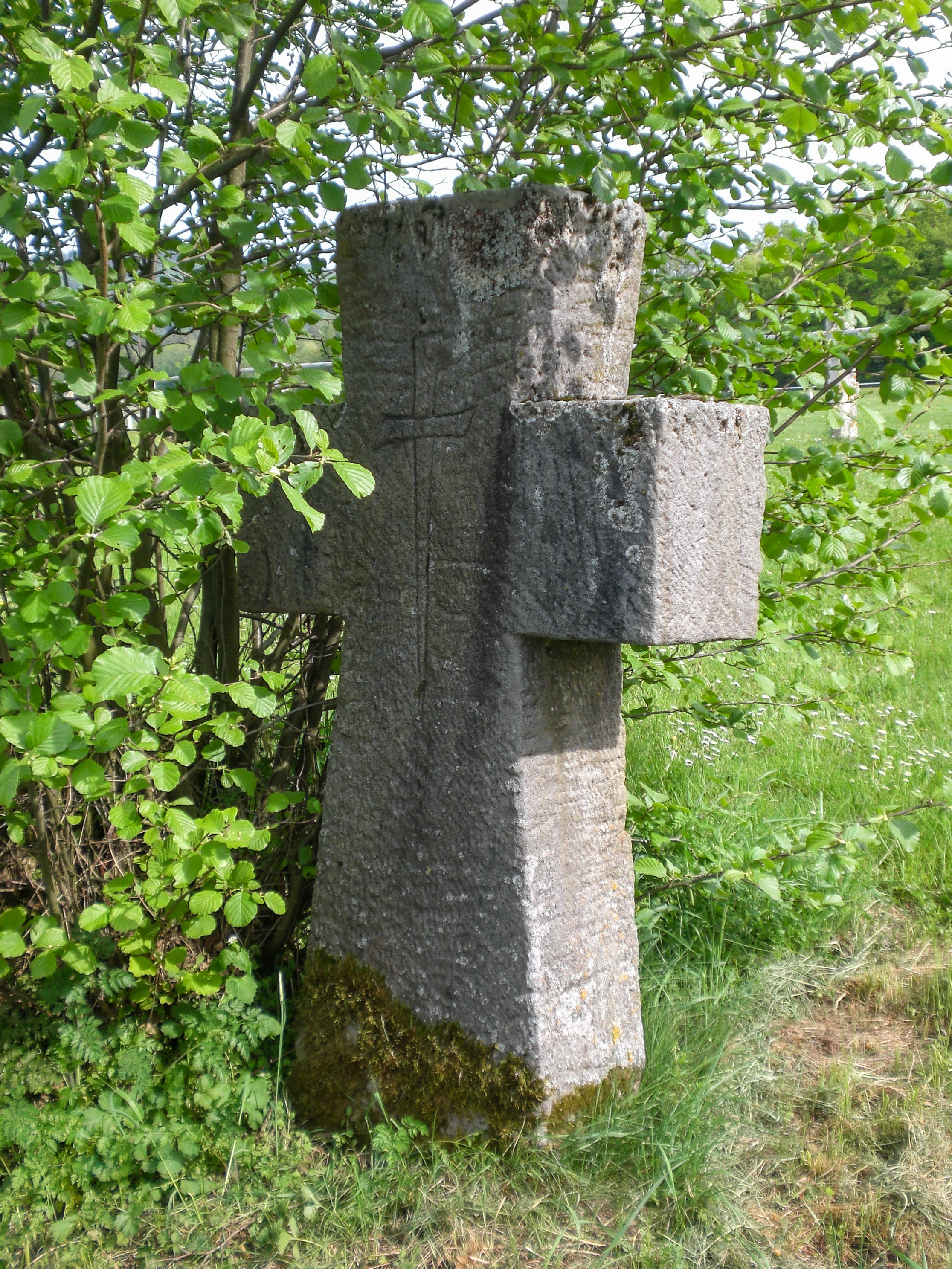 Steinkreuz, Engelthal am Sportplatz, Sicht von vorne